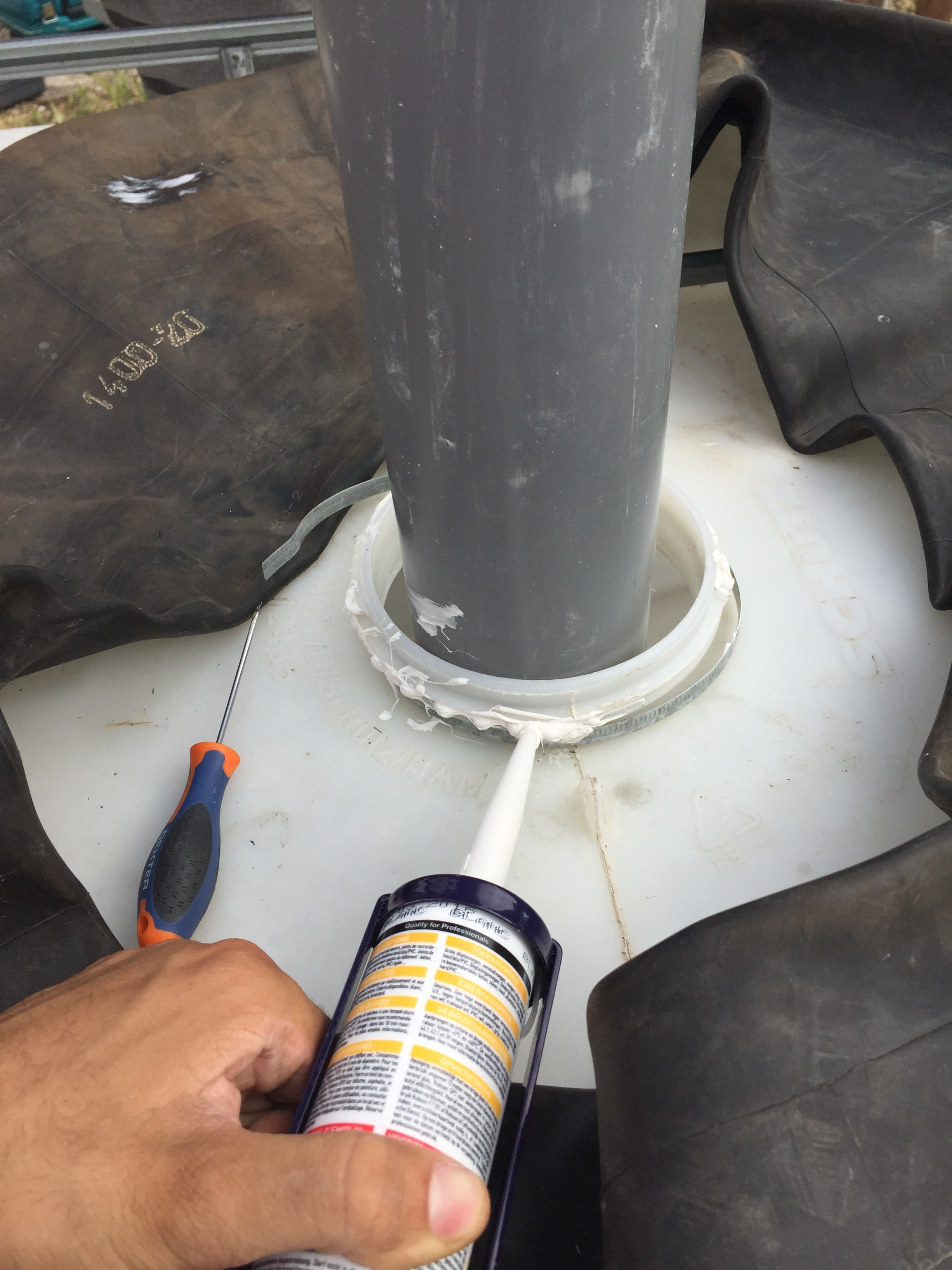 Du silicone ainsi que de la colle PVC/plastique est apposée sur le pourtour de la bouche d'admission afin d'assurer l'étanchéité de l'ensemble.